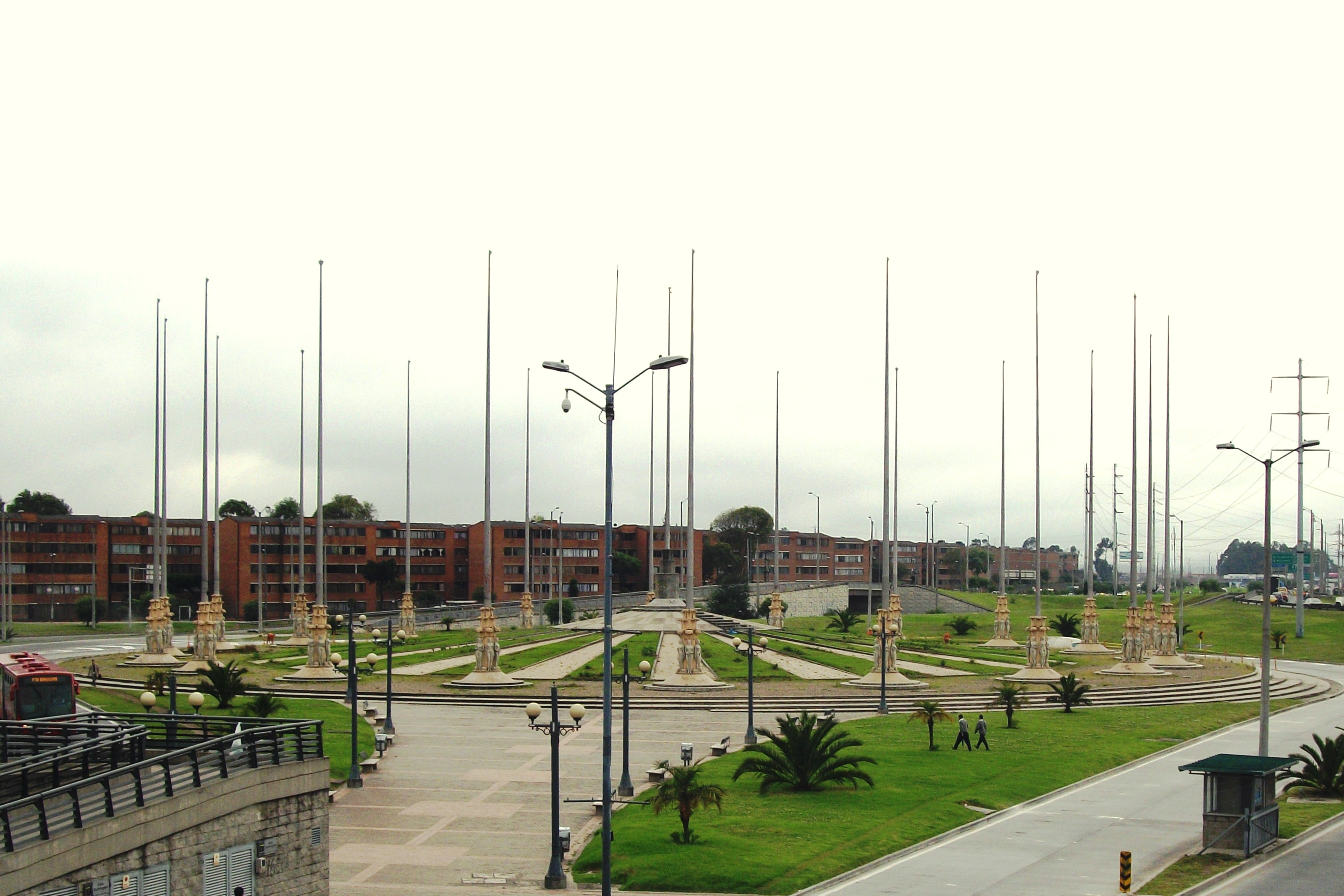 Banderas Bogotá.